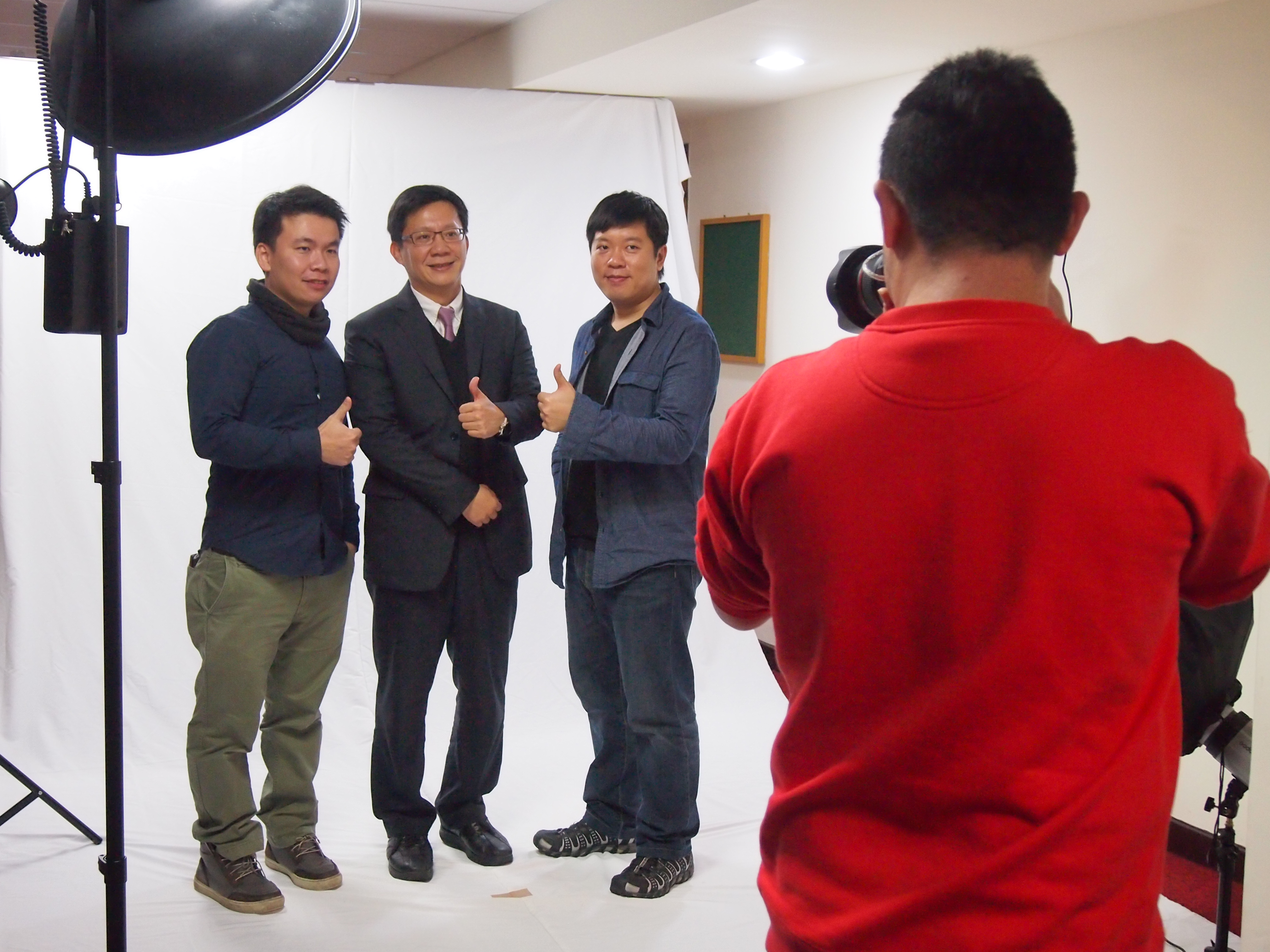 2016年台灣「走進新國會‧拍出新臉孔」工作現場照